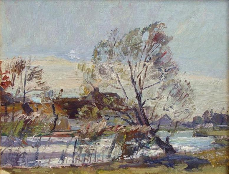 Flusslandschaft